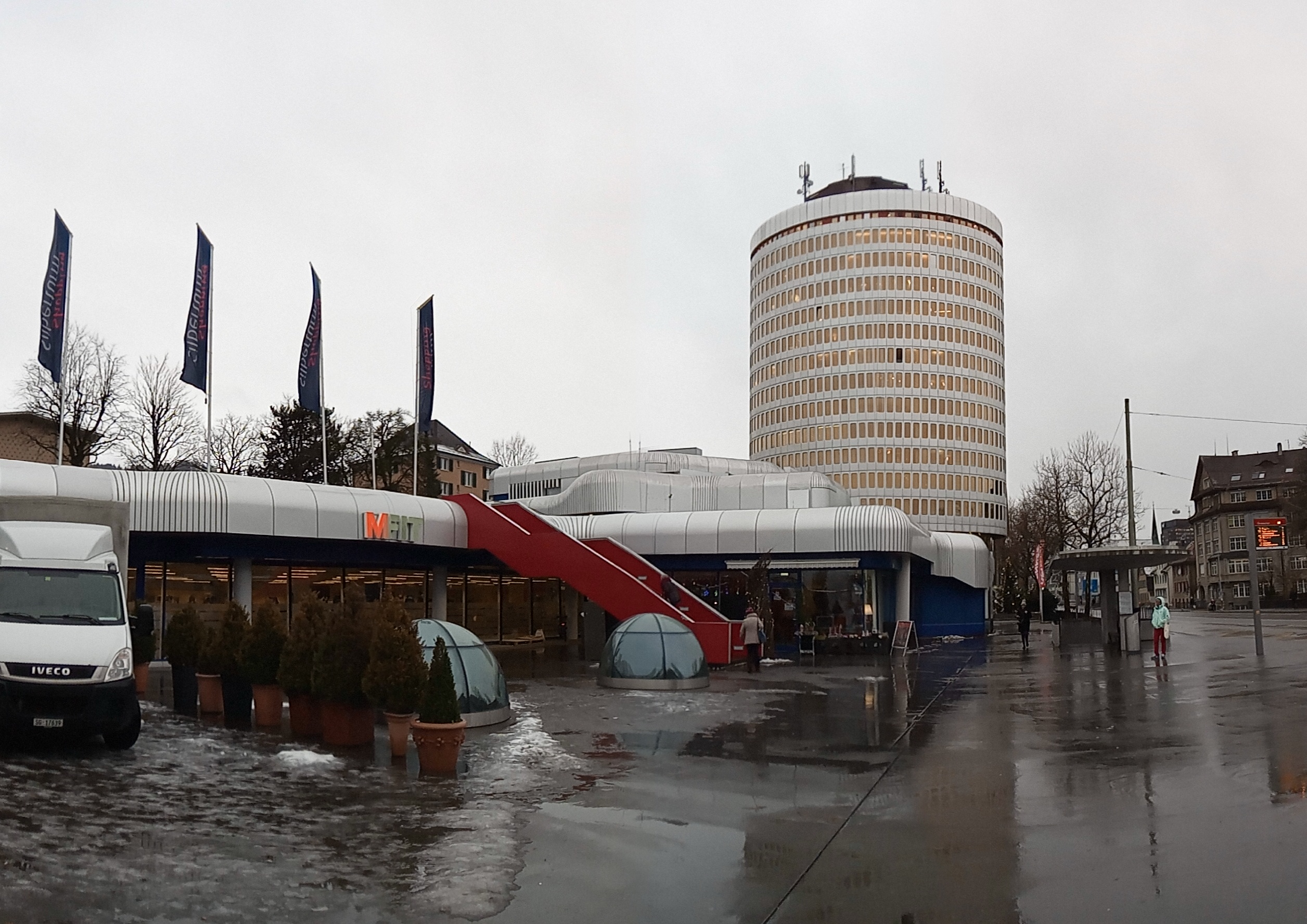 Das Einkaufszentrum Grossacker und das Wahrzeichen St. Fidens, der 'Silberturm'